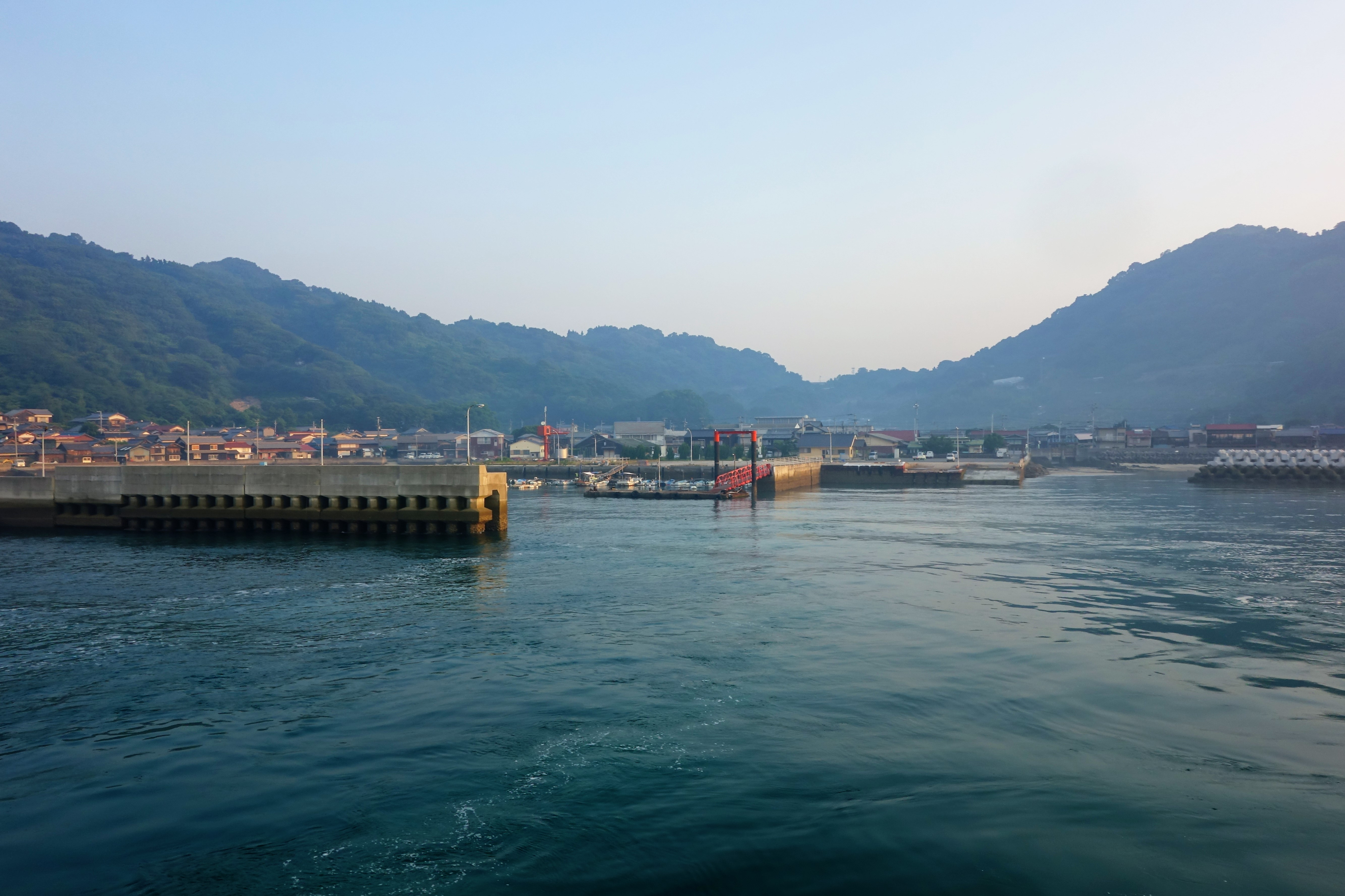 愛媛県松山市に所属する睦月島の睦月港。2018年撮影。乗船、下船する客がいないとフェリーは接岸せずにＵターンしてしまう。